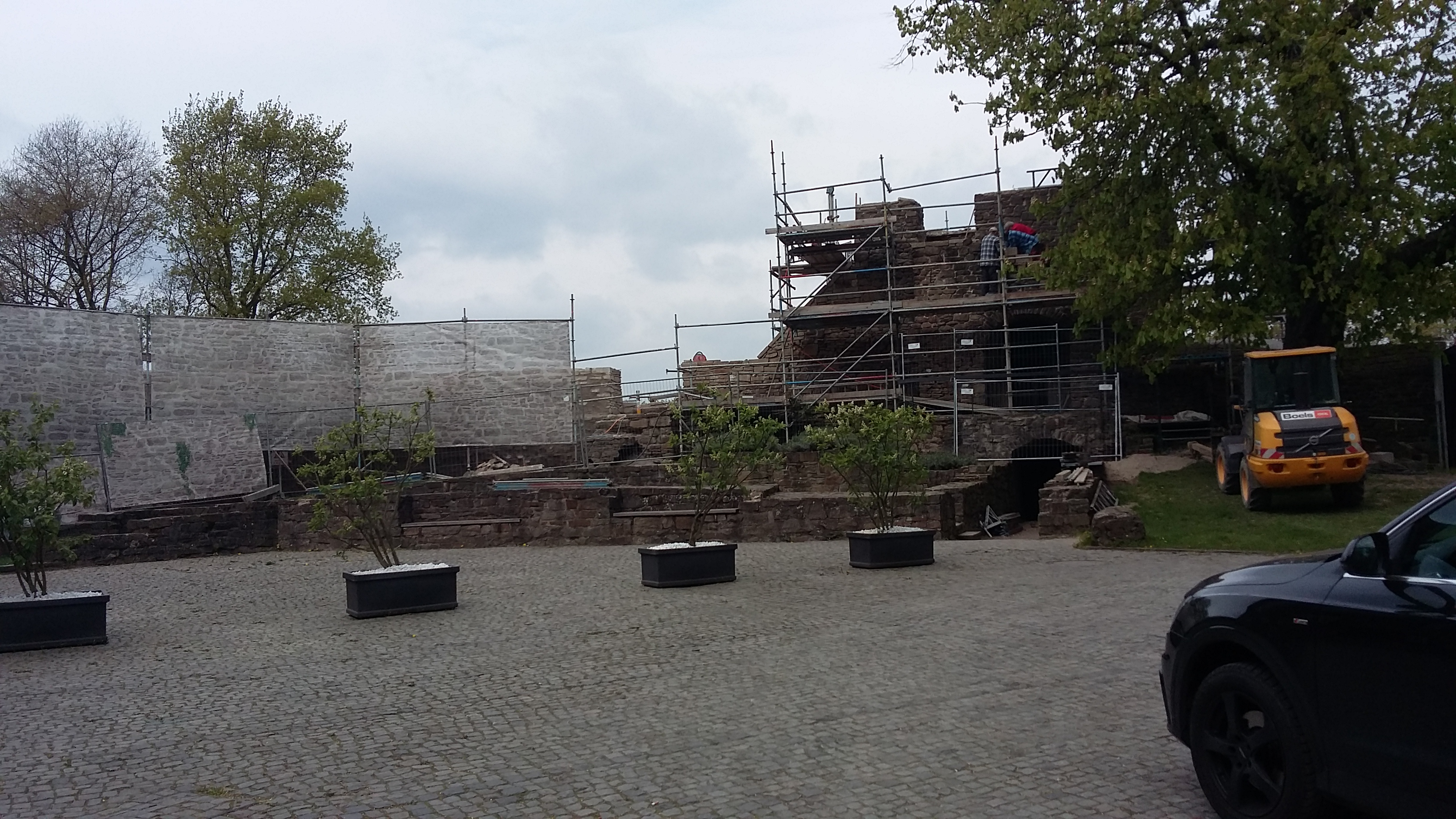 Schloss Broich - 12 April 2017, seit 2010 ist renoviert.